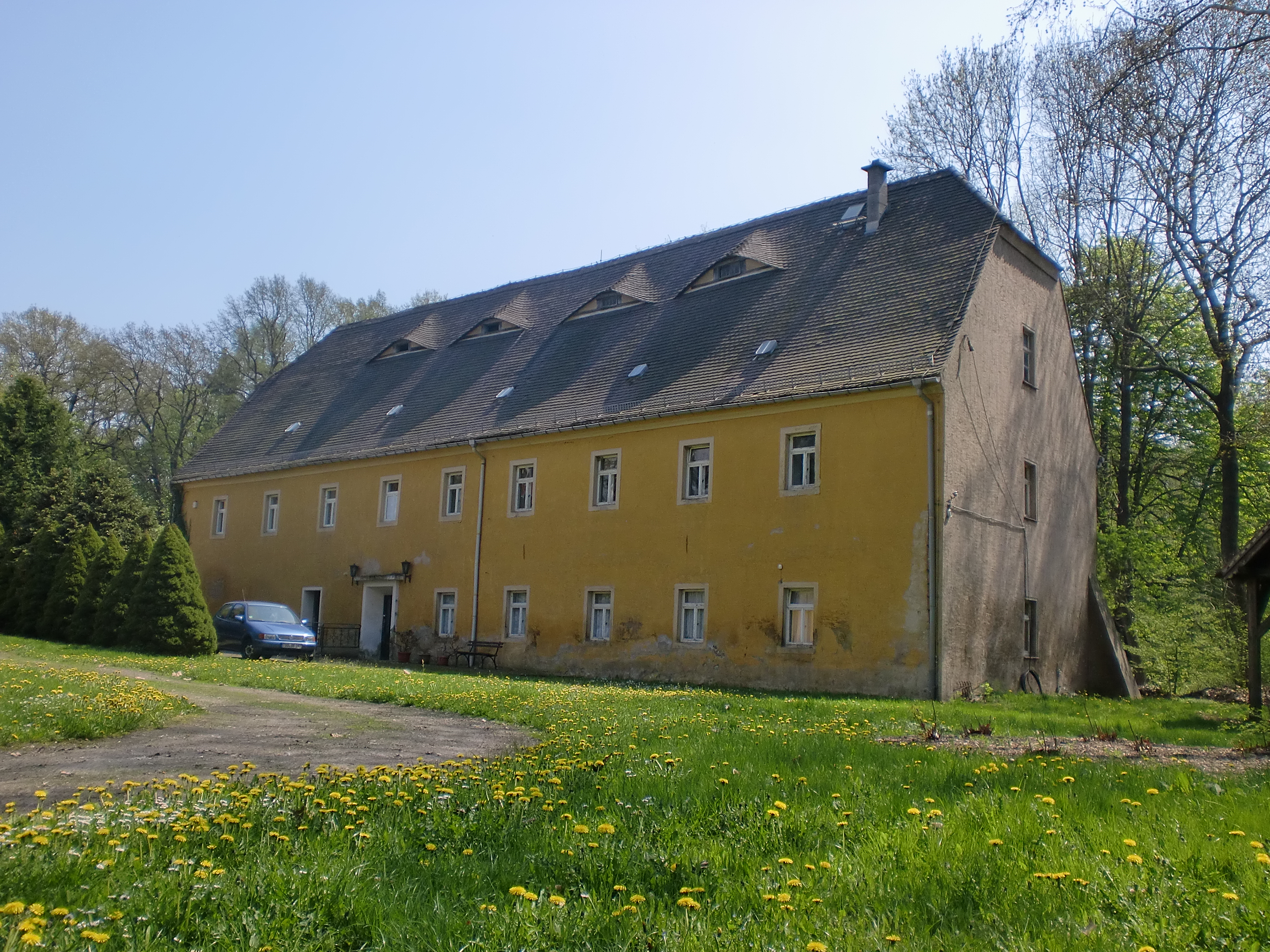 Das Kavaliershaus "Gärtnerhaus" an der Südseite des Ehrenshofes